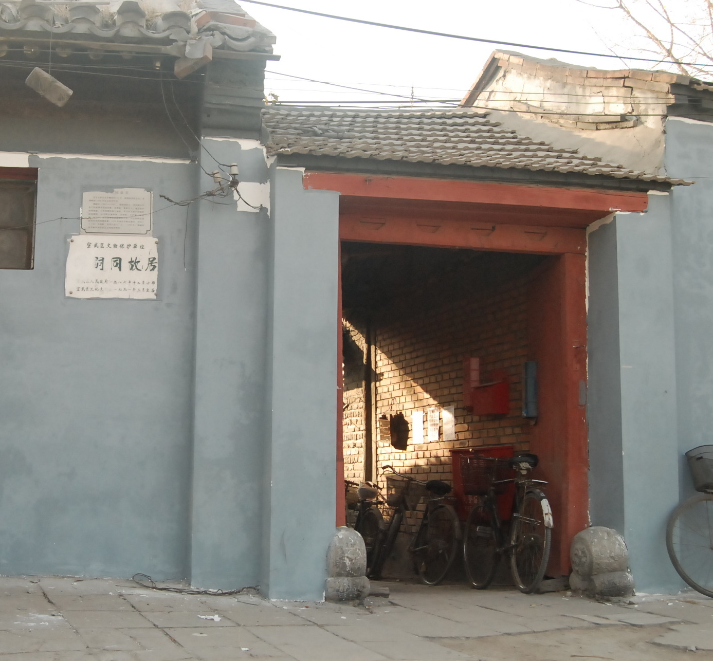 北京的谭嗣同故居